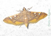 Prophantis smaragdina (Butler, 1875)